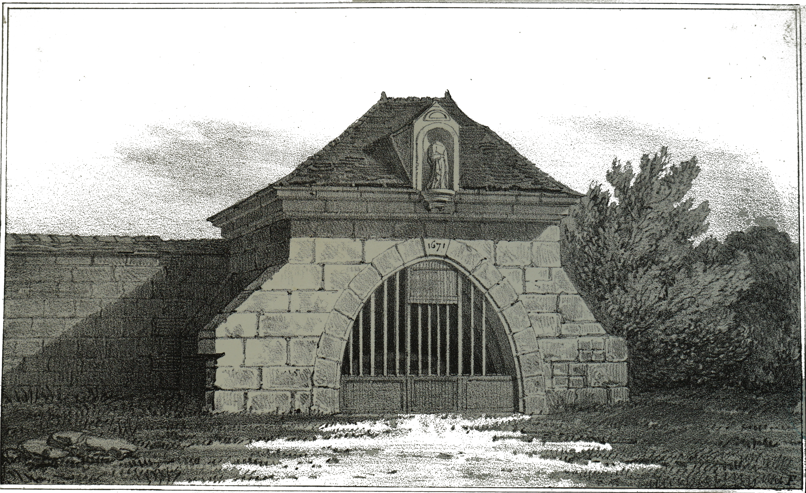 par un dessin d'Arsène Fléchey.